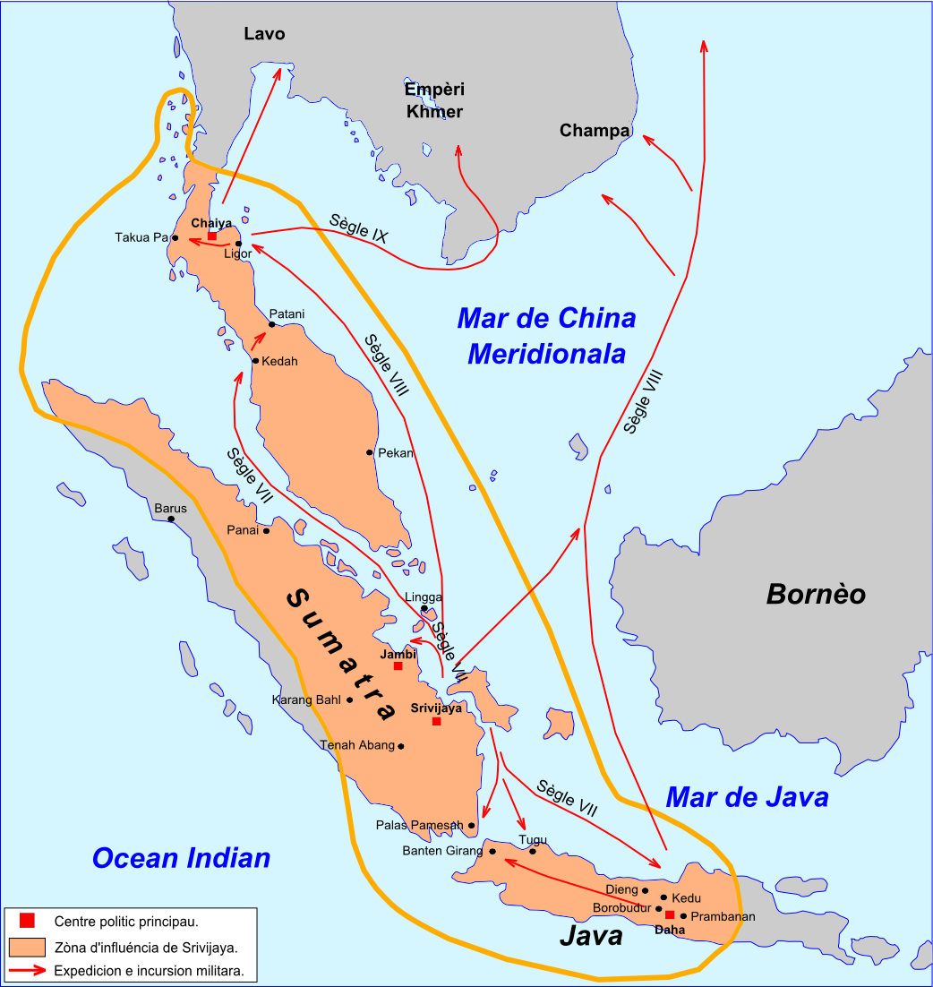 Zòna d'influéncia de la talassocracia de Srivijaya.